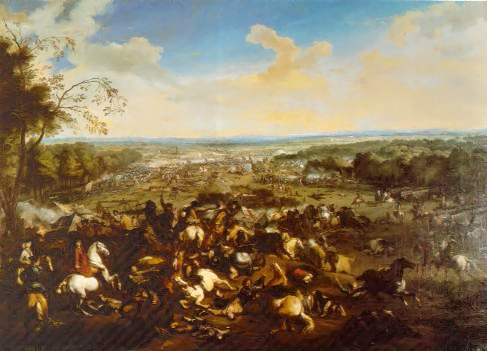 peinture XVIIIe